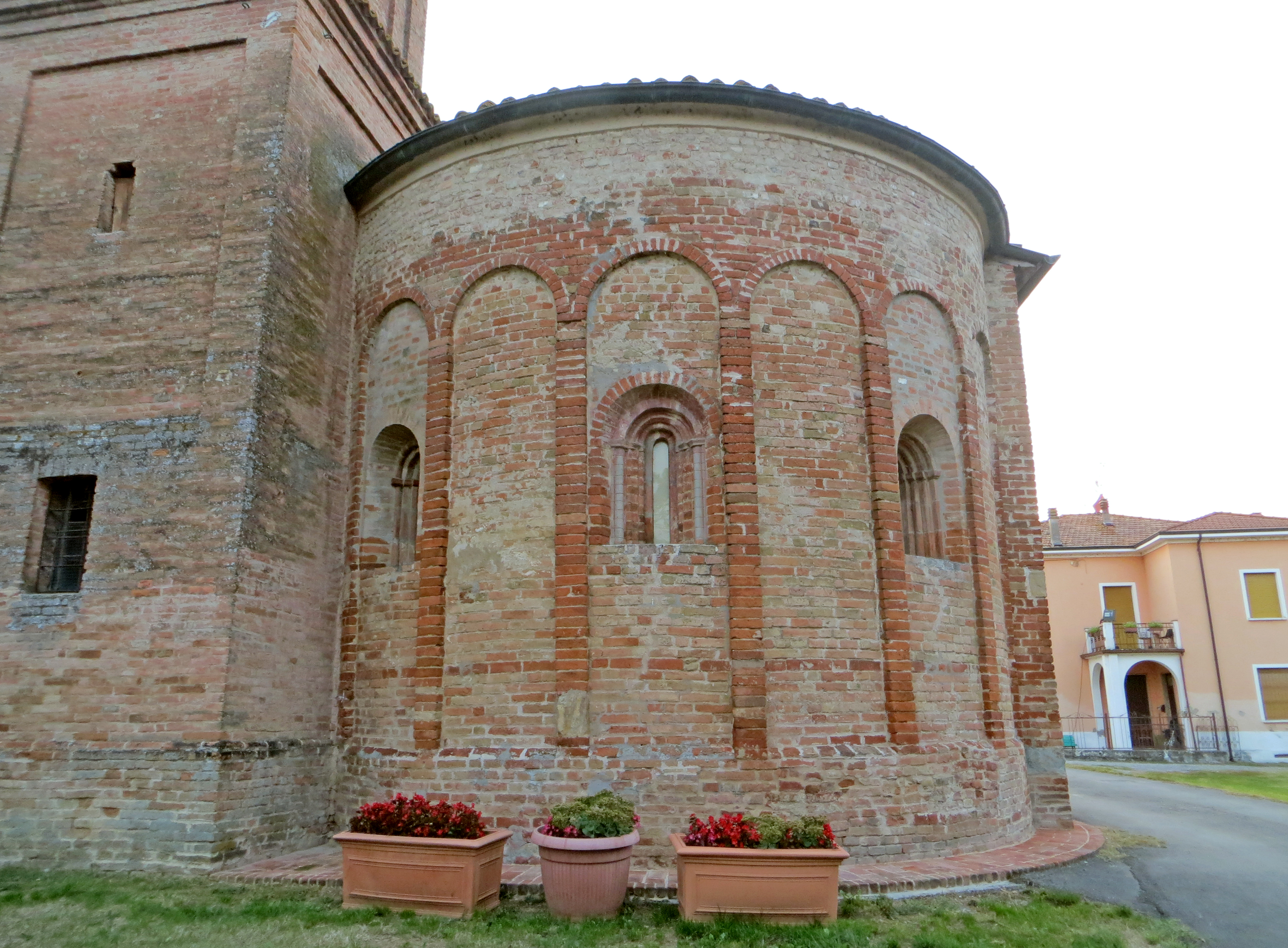 Chiesa di San Tommaso Becket (Cabriolo, Fidenza) - abside